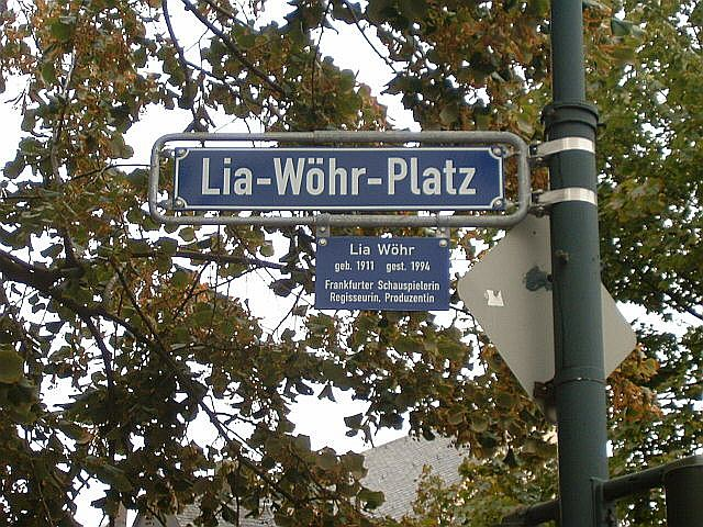 PD, selbst fotografiert am 17.9.04, Bild: Straßenschild, Lia Wöhr Platz.